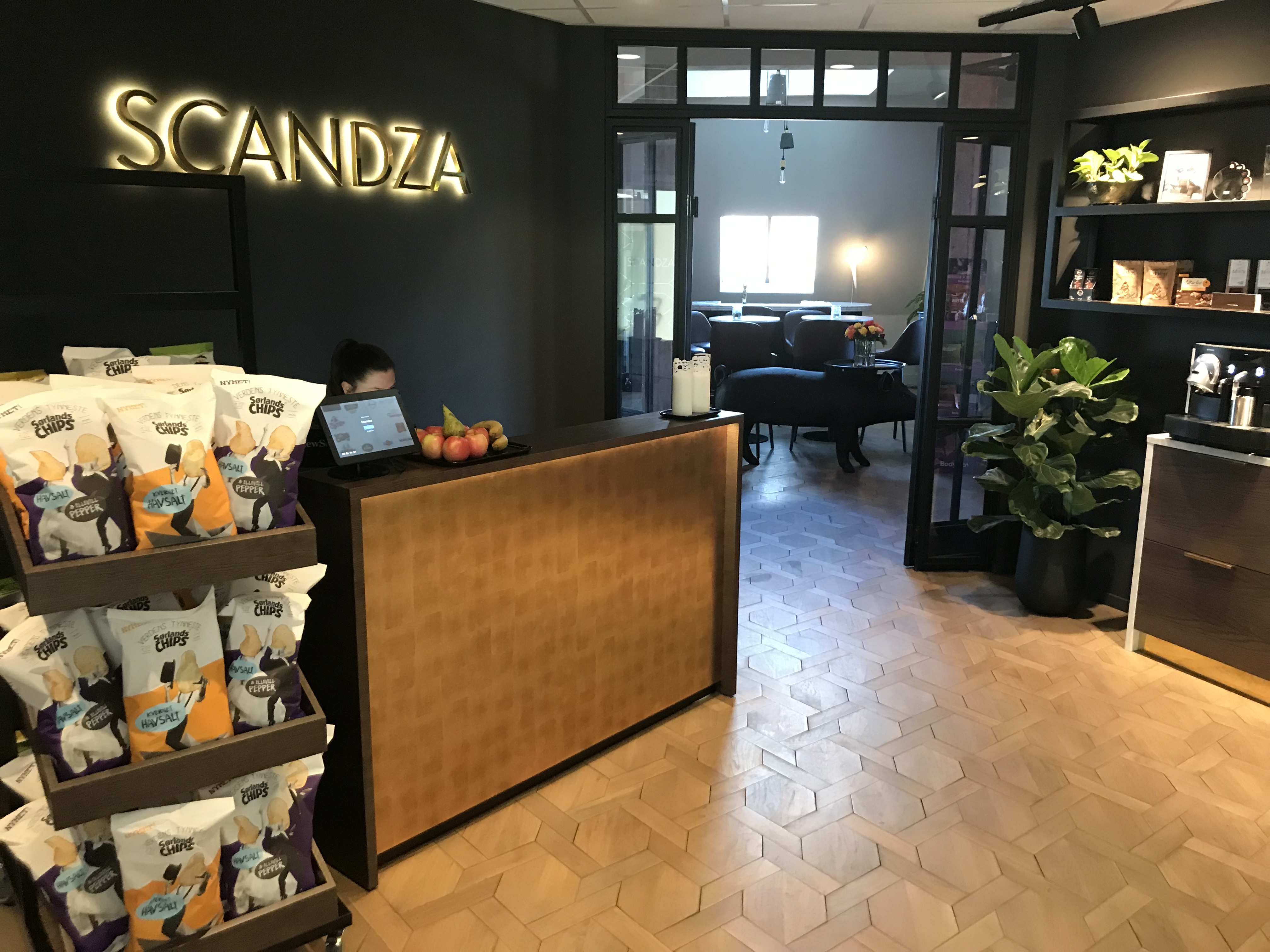 Resepsjonen til Scandza i Oslo